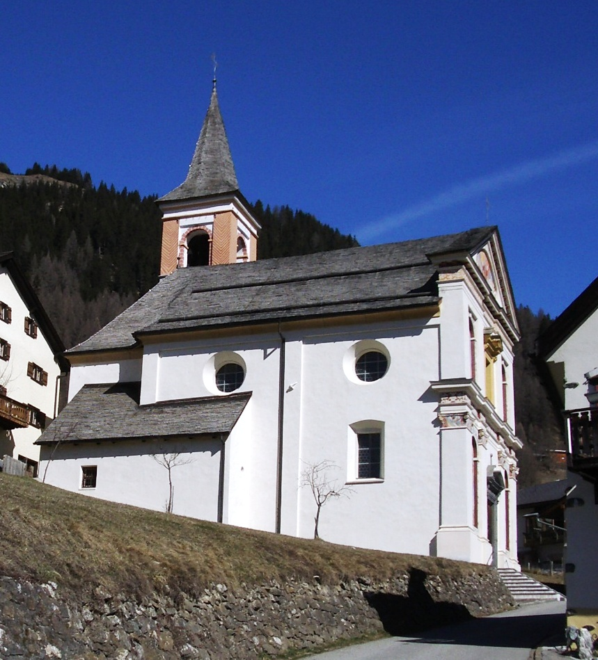 Lain GR, Switzerland self-made, March 2007